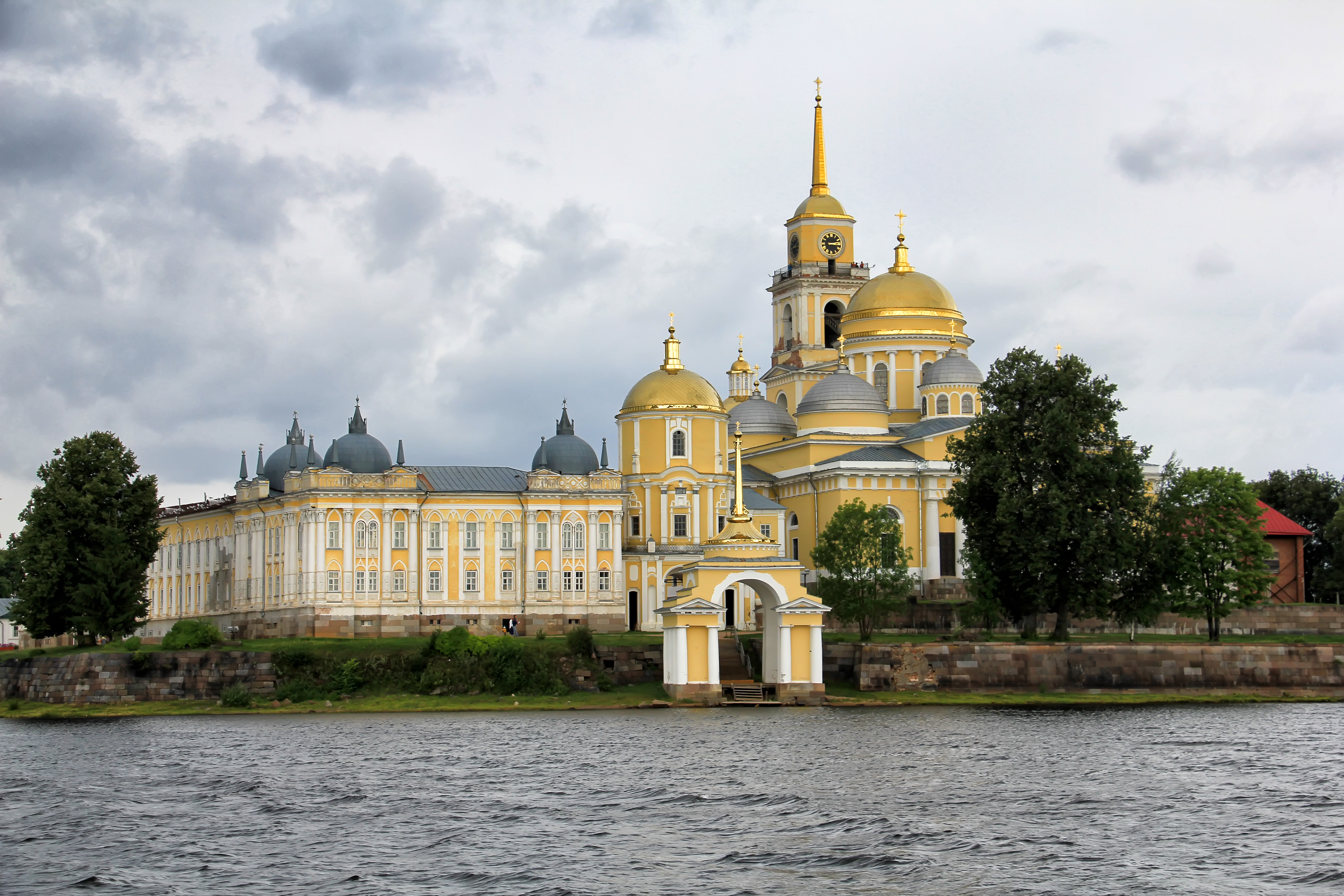 Монастырь Нилова пустынь: остров Столбной, Селигер, Осташковский район, Тверская область